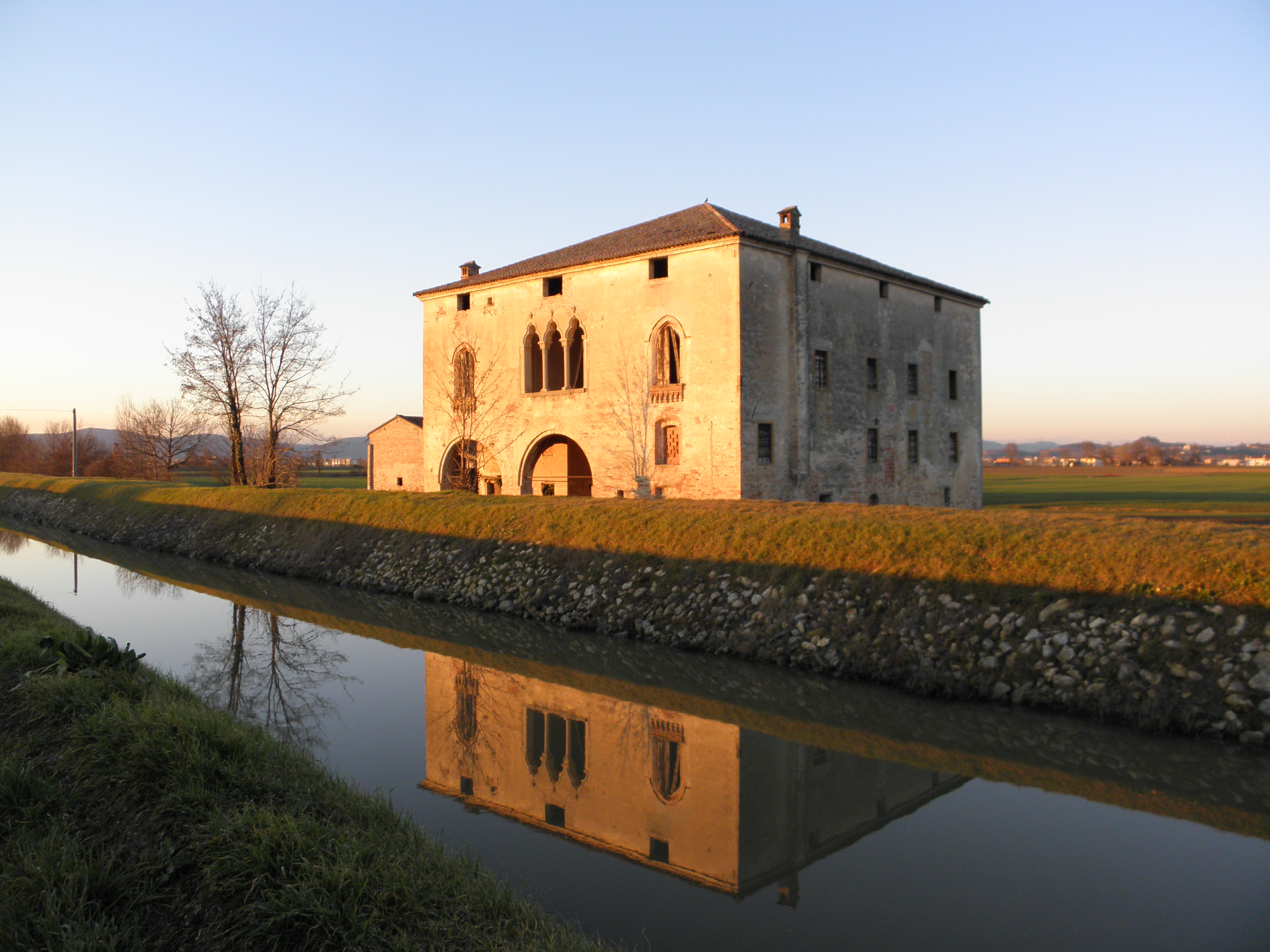 Agugliaro, la quattrocentesca Villa Dal Verme.